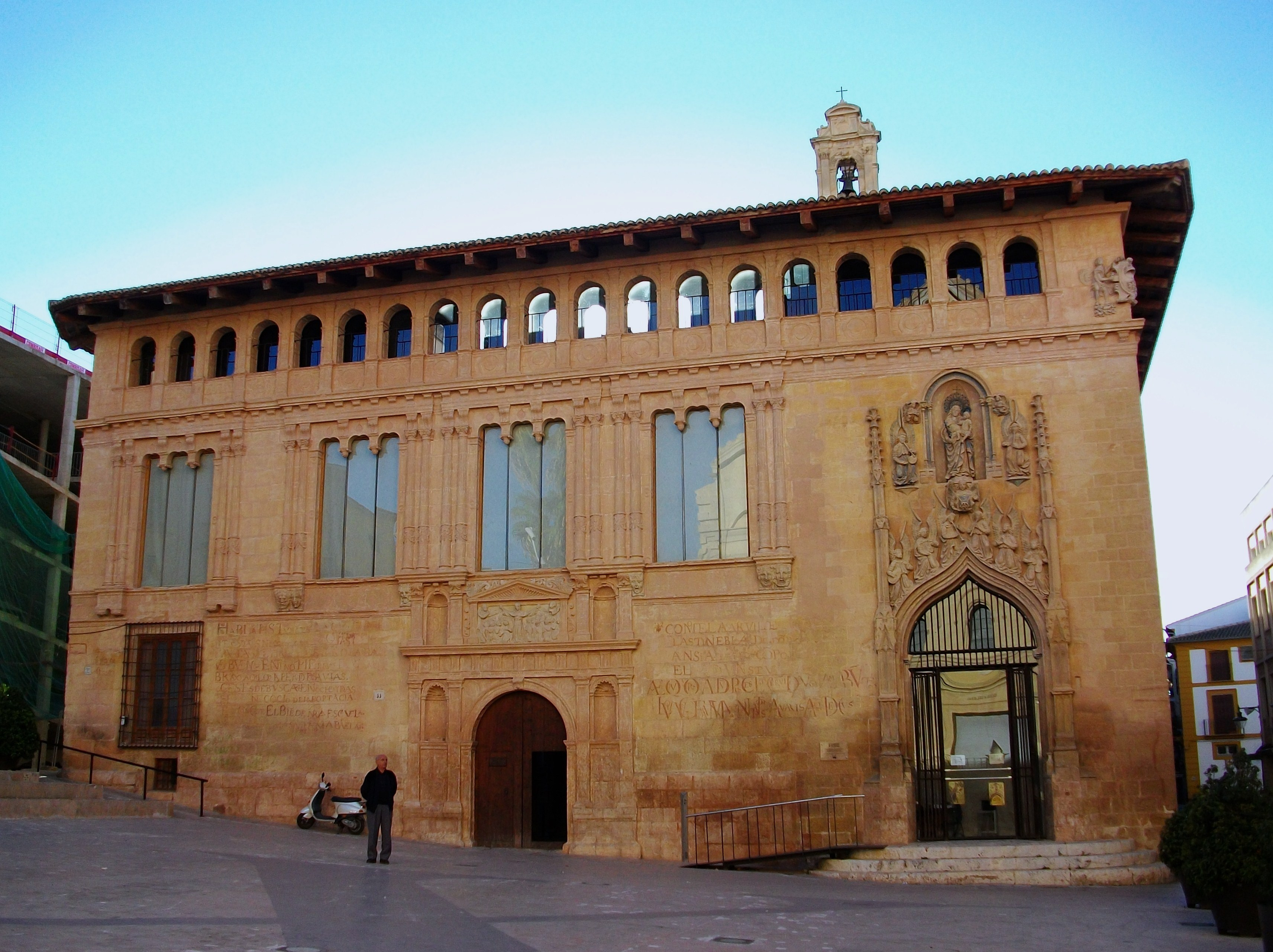 Hospital Reial o Hospital Major de Pobres de Xàtiva, s. XV-XVI i posteriors.